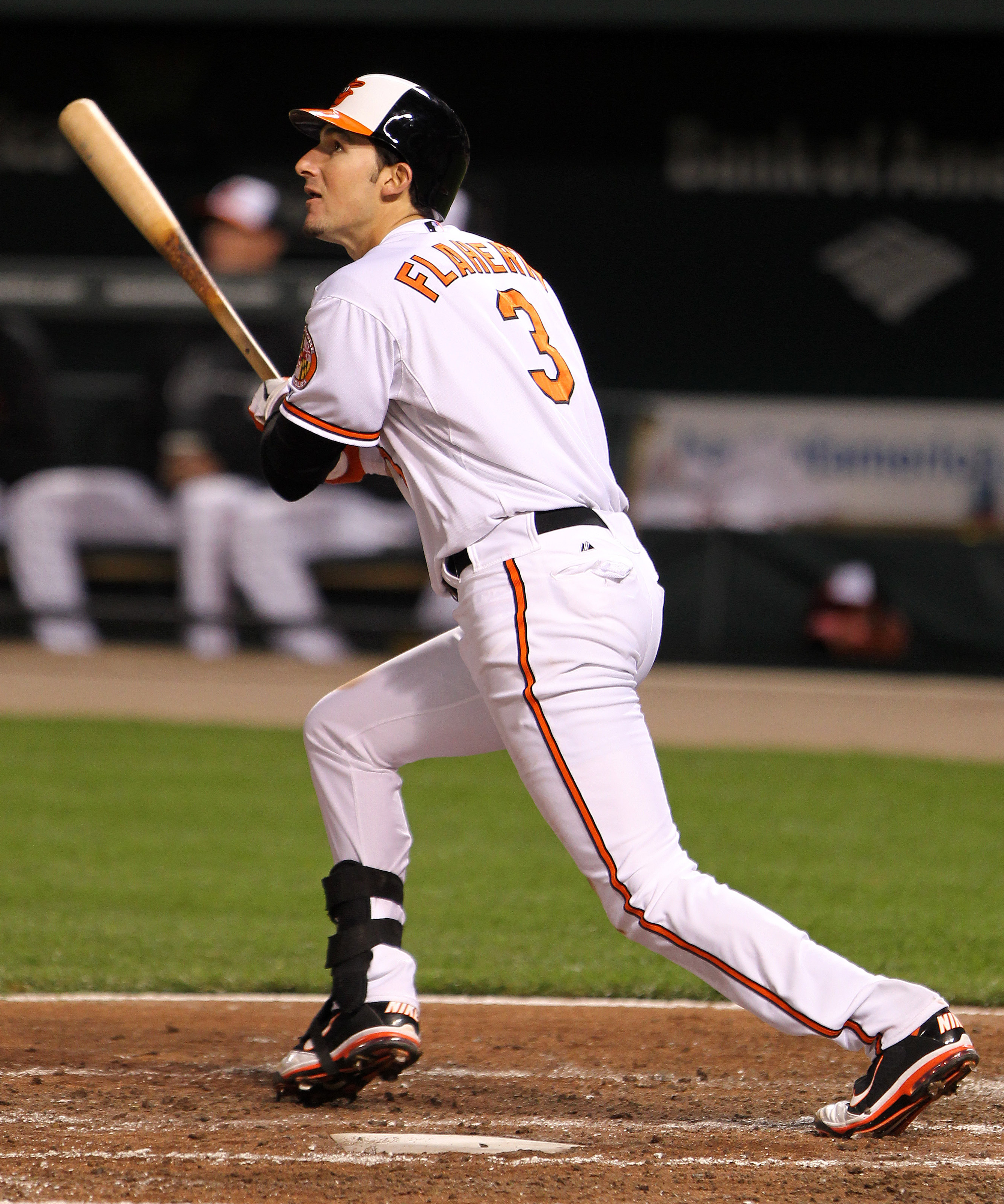 Ryan Flaherty